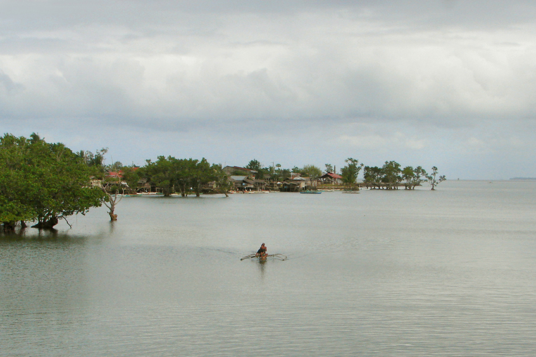 Buenavista, Bohol, Philippines